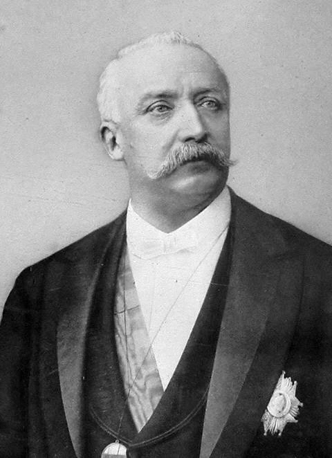 Félix Faure d'après gravure officielle ( Pierre Petit photographe)